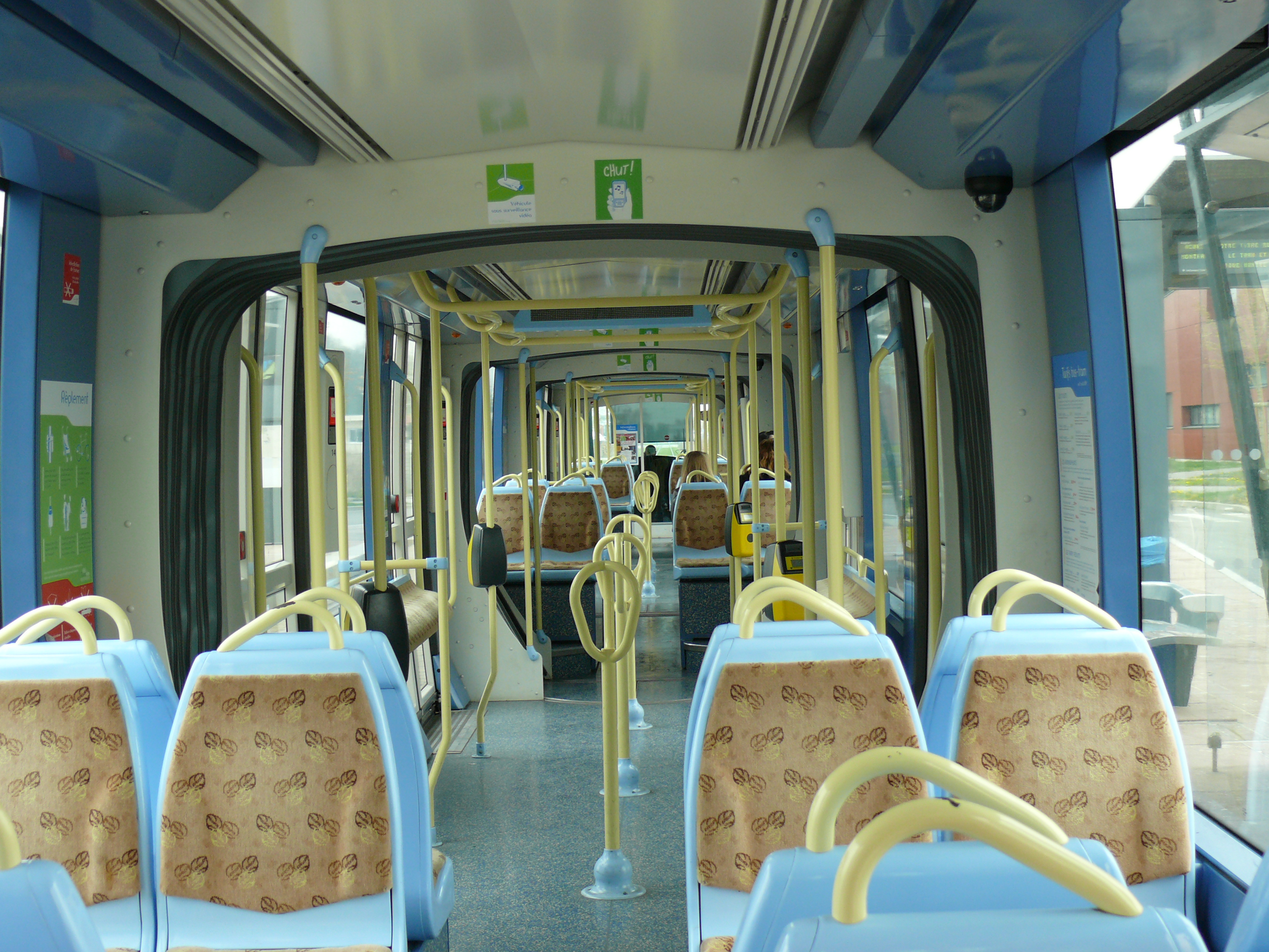 Aménagements intérieurs des rames Citadis du tramway de Valenciennes